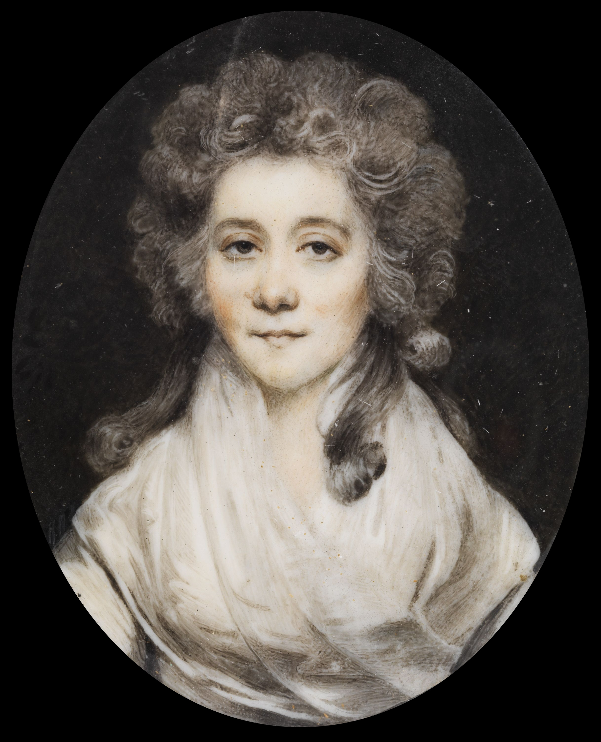 Fürstin Anna Obolenskaja